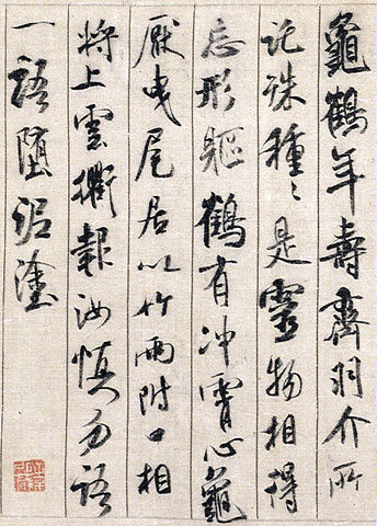 [宋] 米芾 《蜀素帖》（局部） 绢本墨迹行书 纵29.7厘米 横284.3厘米 现藏台湾國立故宫博物院 来自